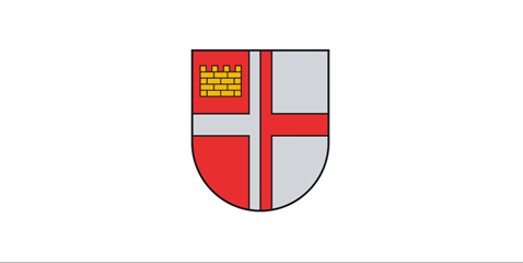 Ikšķiles novada karogs. Avots